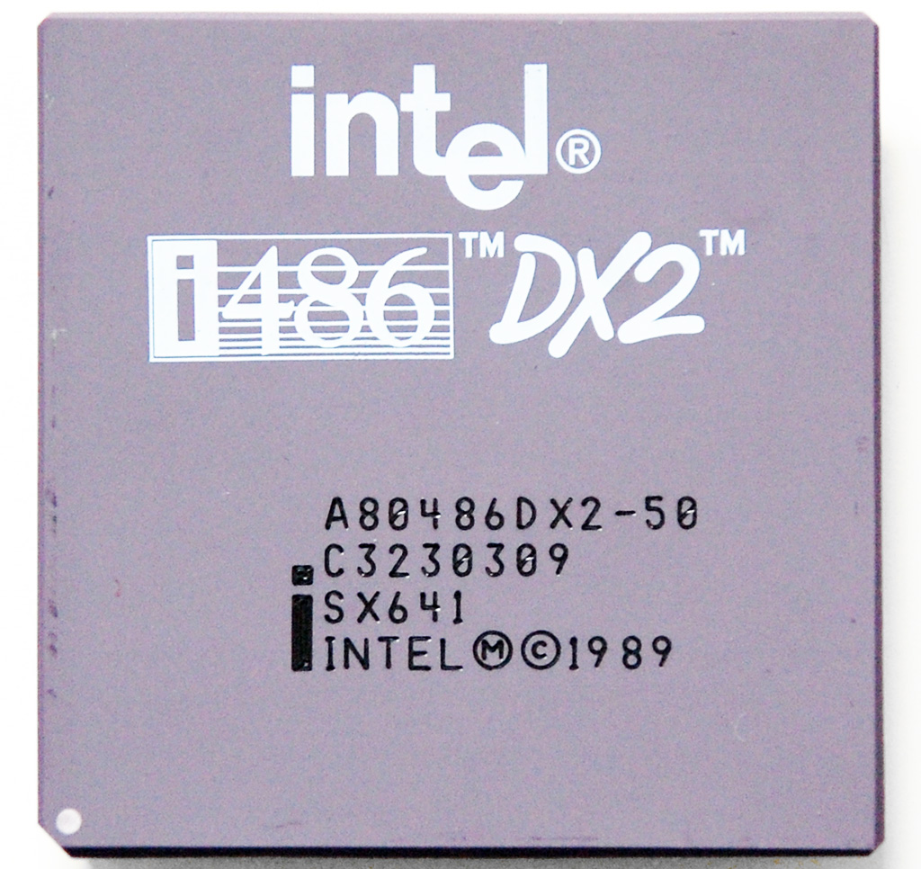 Intel i486 DX2-50